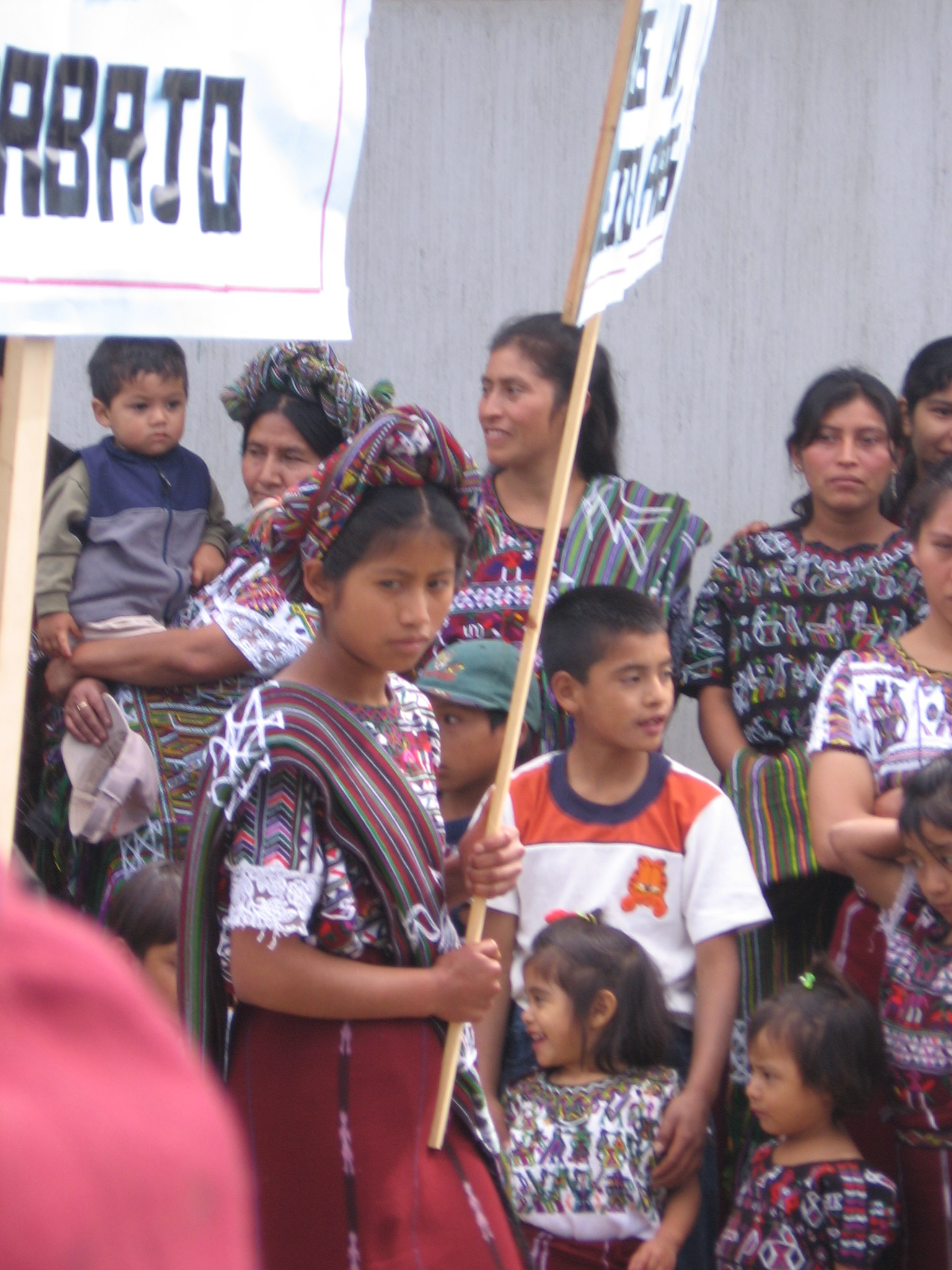 Festival in Nebaj, Guatemalla